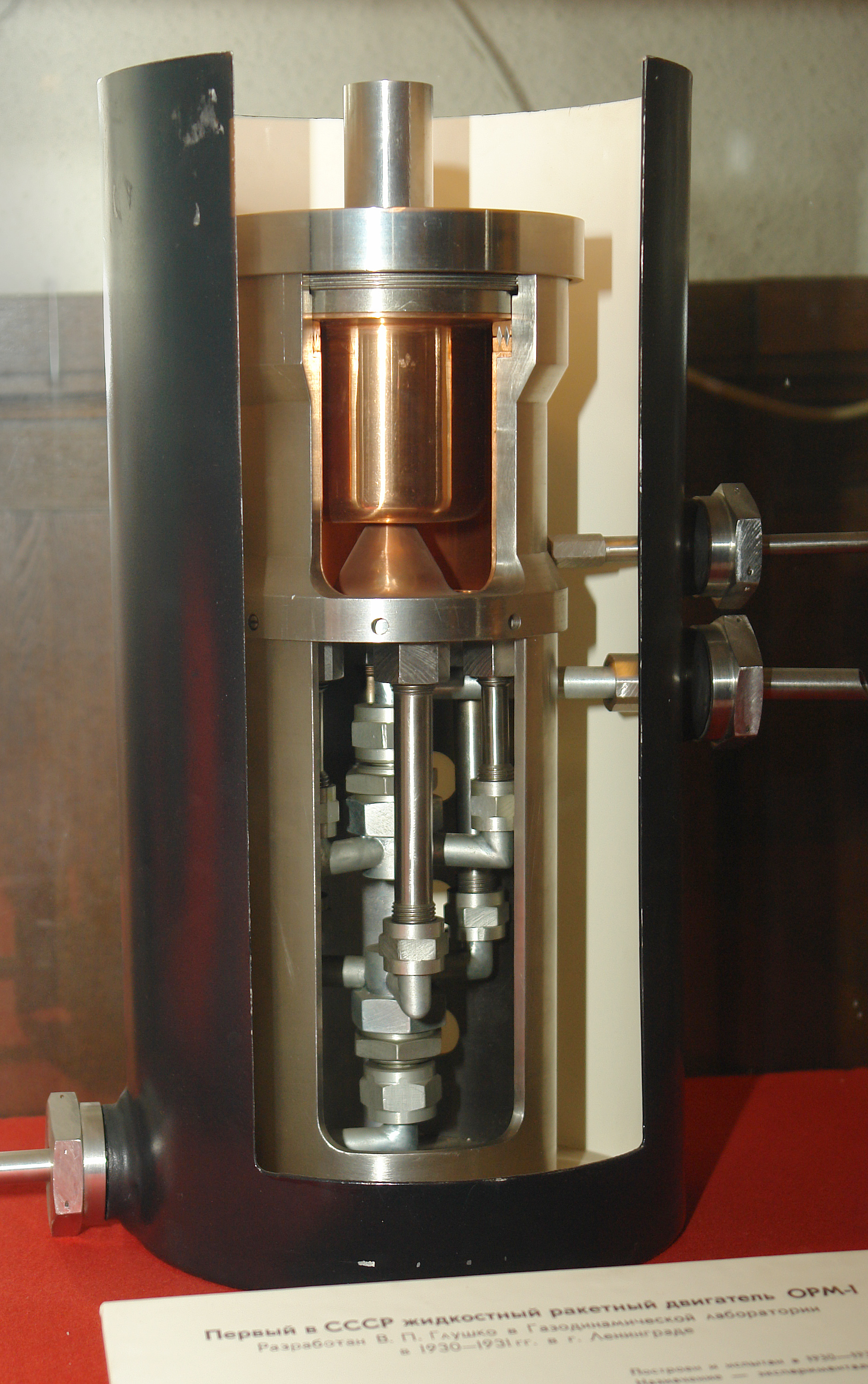 Жидкостный ракетный двигатель ОРМ-1. Музей космонавтики и ракетной техники; Санкт-Петербург. This photograph was taken in Museum of Space and Missile Technology (Saint Petersburg) Object location59° 57′ 07″ N, 30° 19′ 16″ E